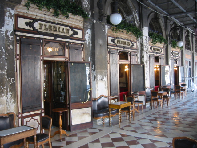 Café Florian - Venise